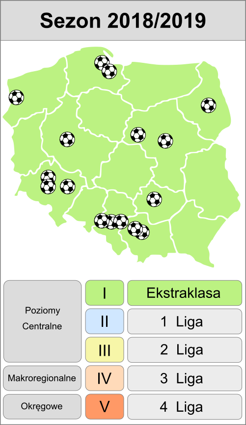 Mapka drużyn występujących w ekstraklasie 2018/19